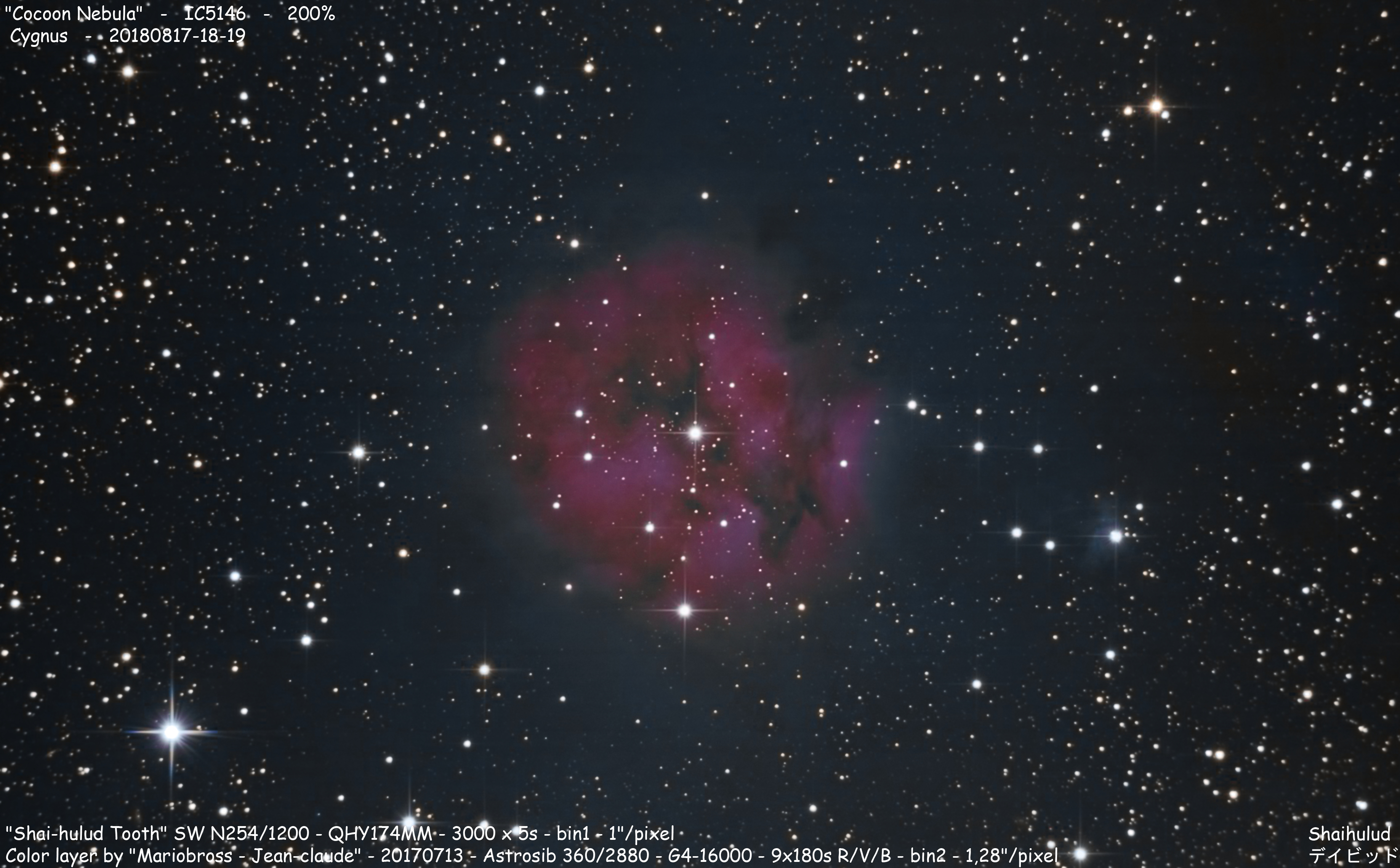 "Cocoon Nebula" IC5146